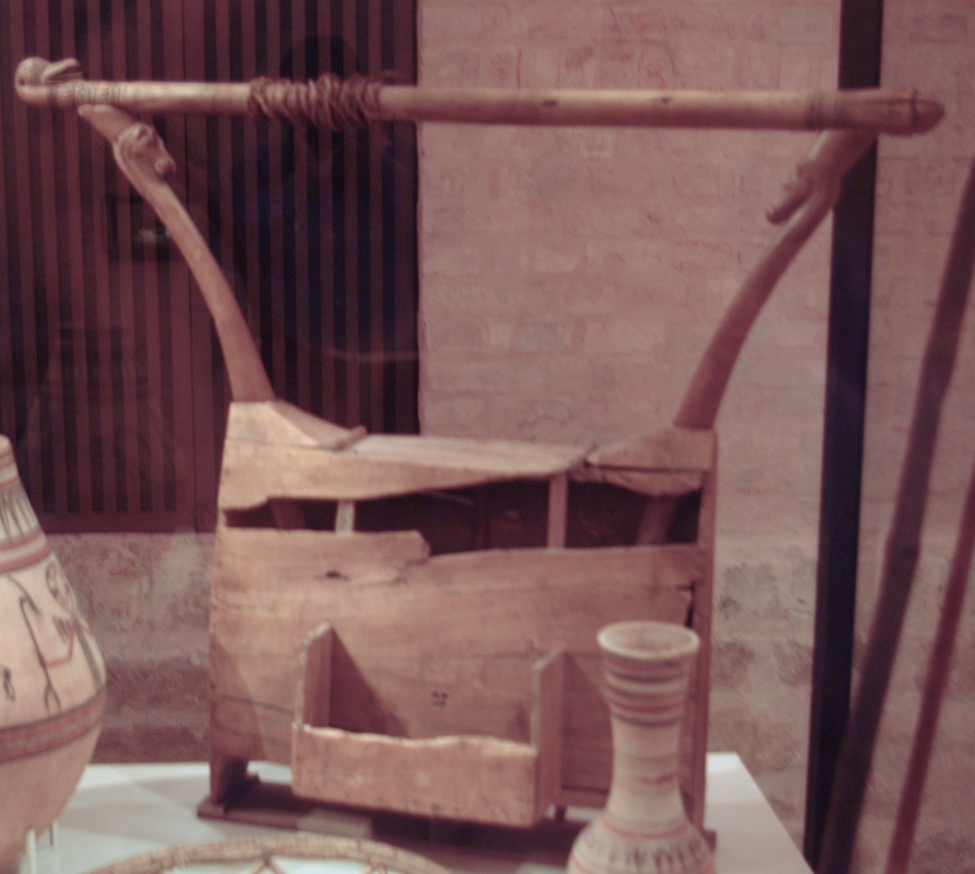 Leier mit Pferdeköpfen, Ägypten, Neues Reich, 18. Dynastie, 1340-1290 v.u.Z., Inventarnummer AM10247